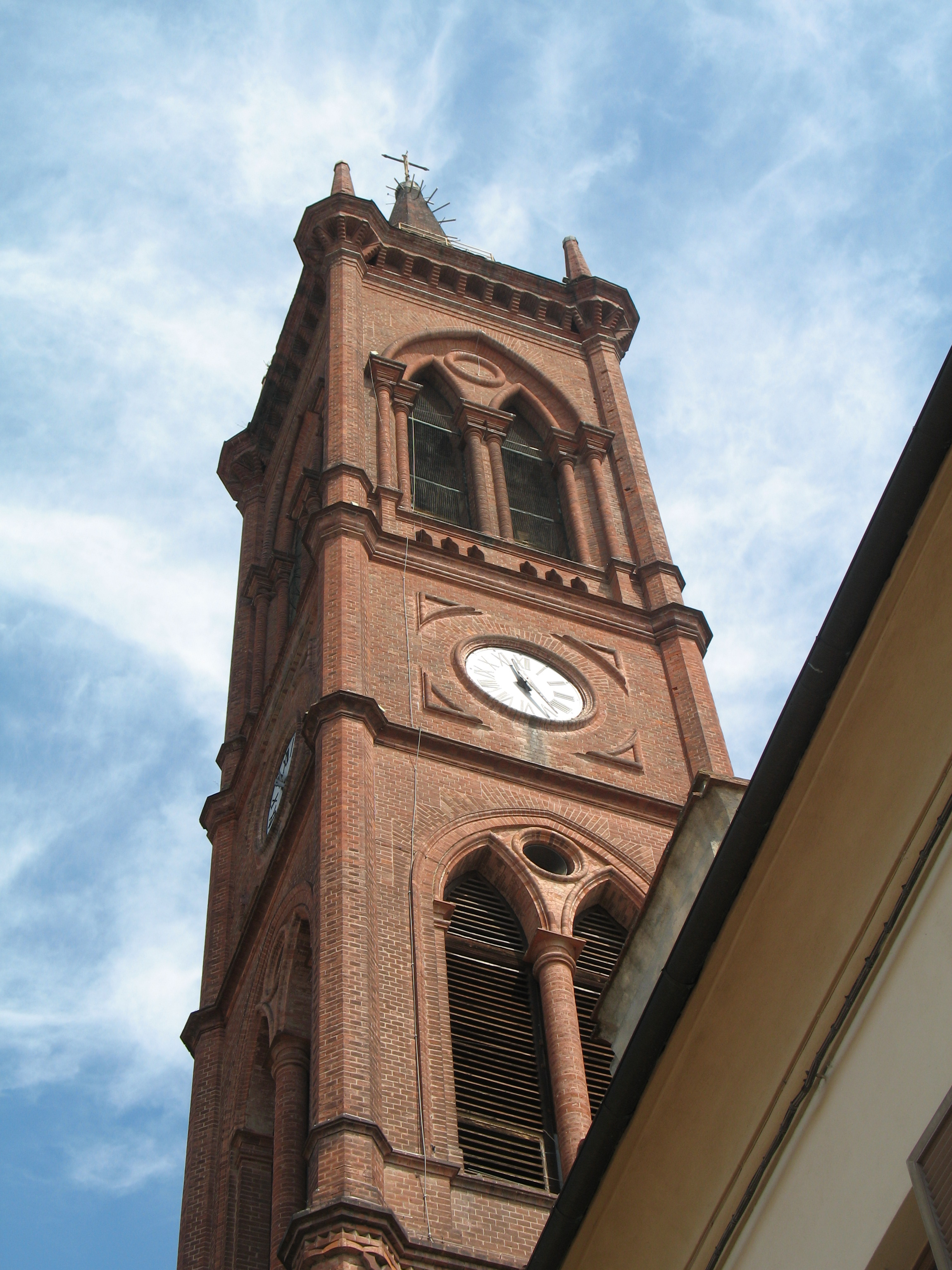 Campanile della chiesa parrocchiale di Santa Maria Assunta, a Fubine, Alessandria, Piemonte, Italia